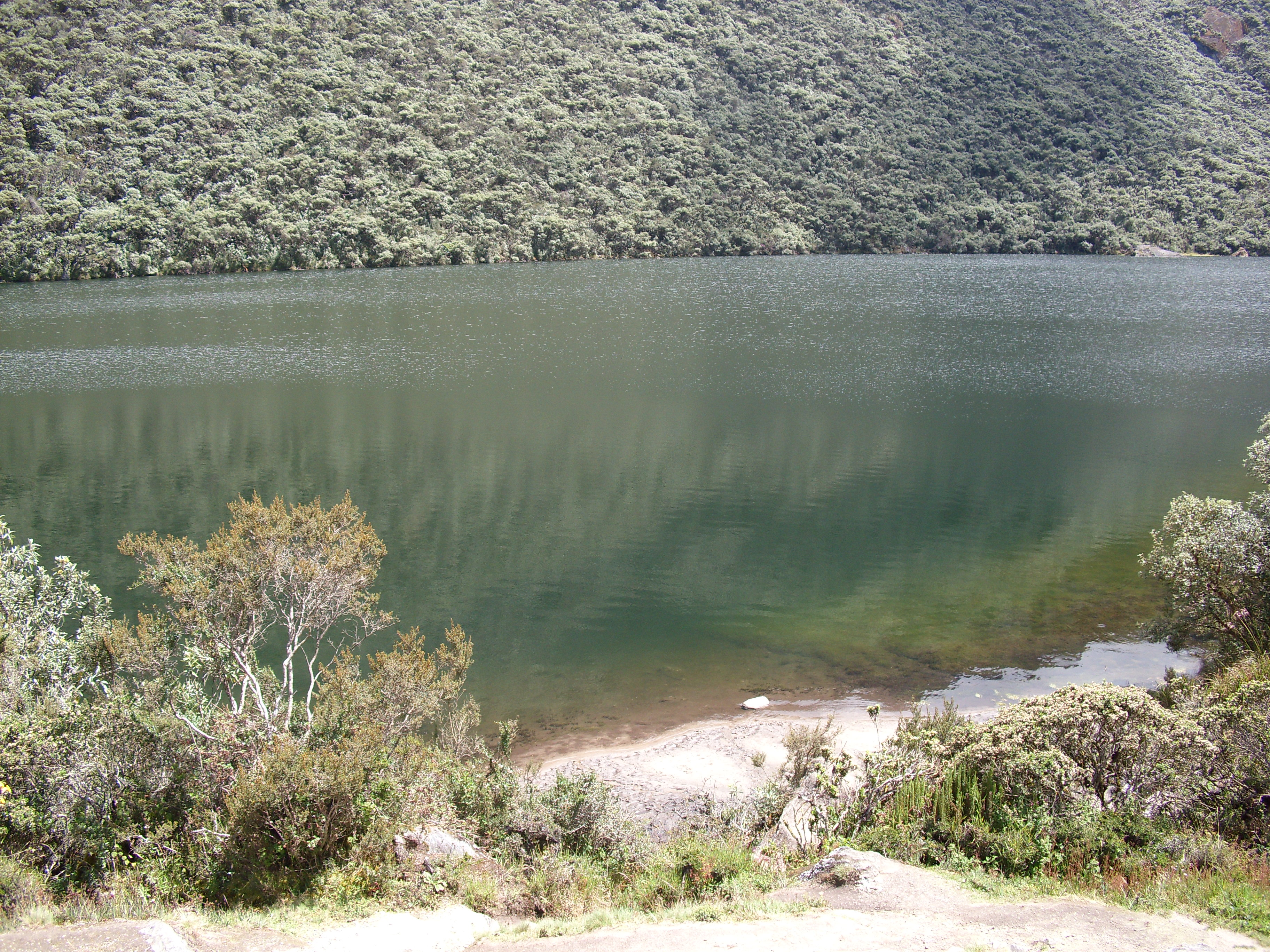 La Laguna Negra, ubicada en Parque Nacional Sierra Nevada.